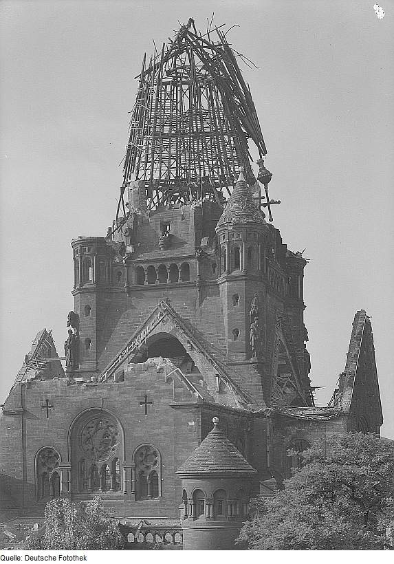 Original image description from the Deutsche Fotothek Dresden. Ruine der Jakobikirche von Nordosten